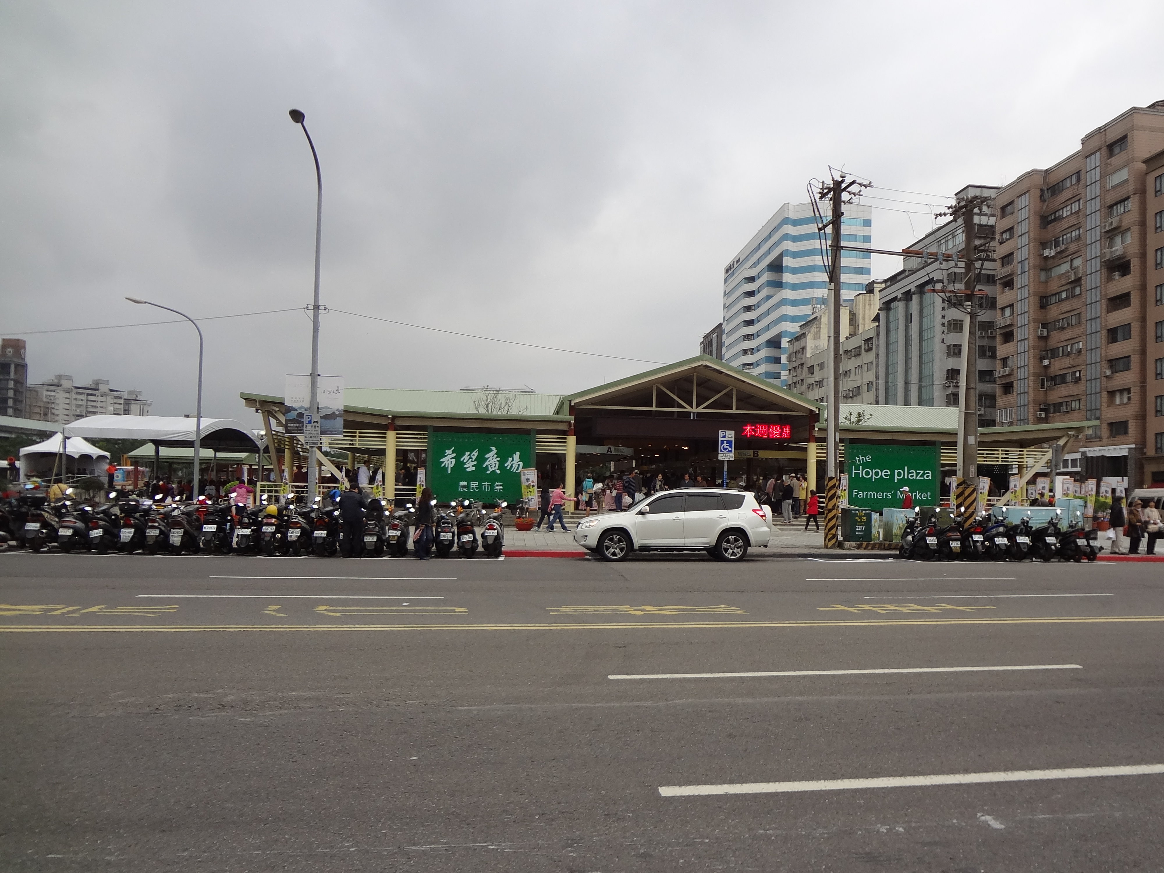 希望廣場農民市集，位於臺北市中正區林森北路與北平東路口，2015年12月6日開幕。